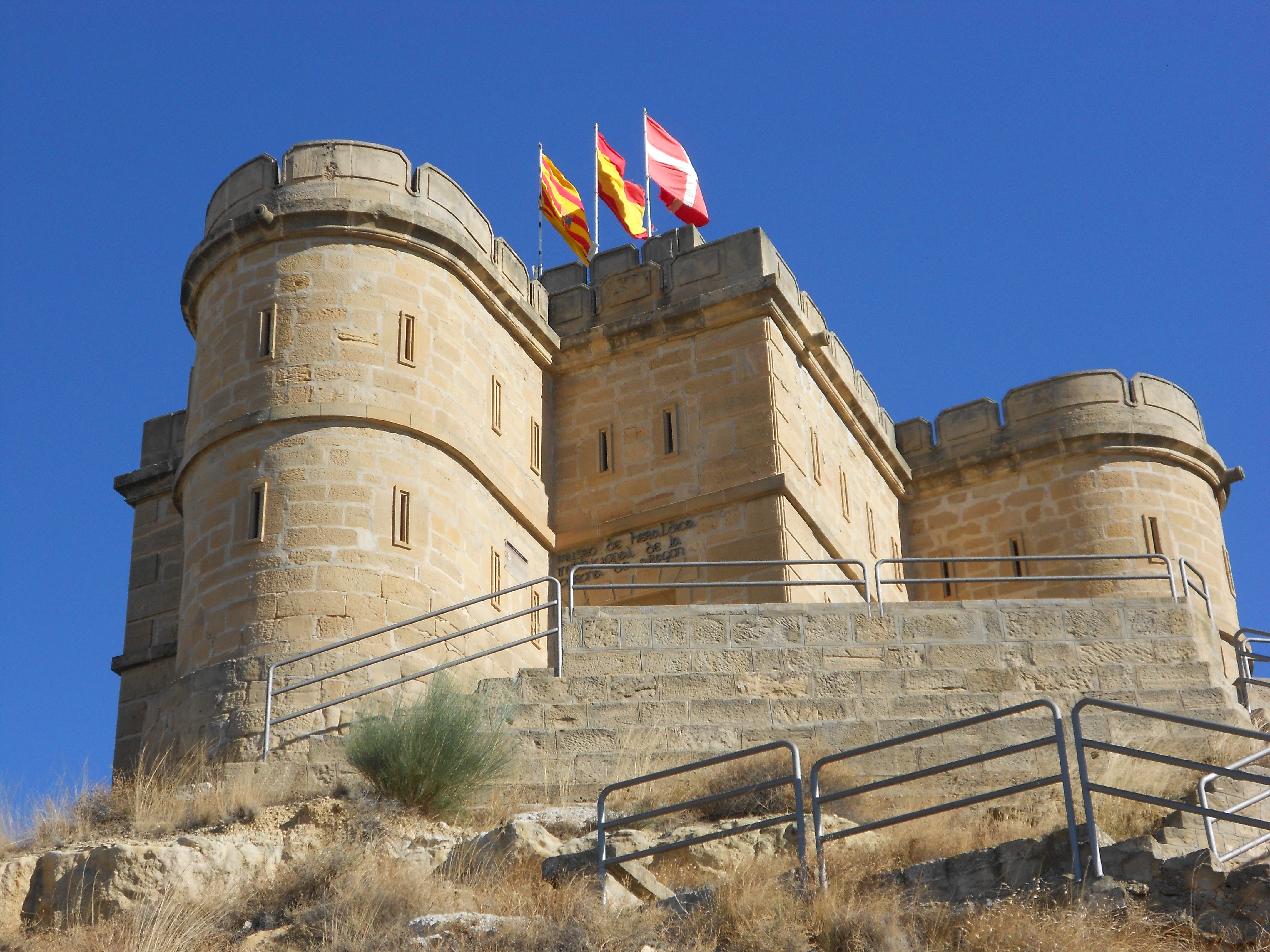 Torre de Salamanca (Caspe, Aragón)